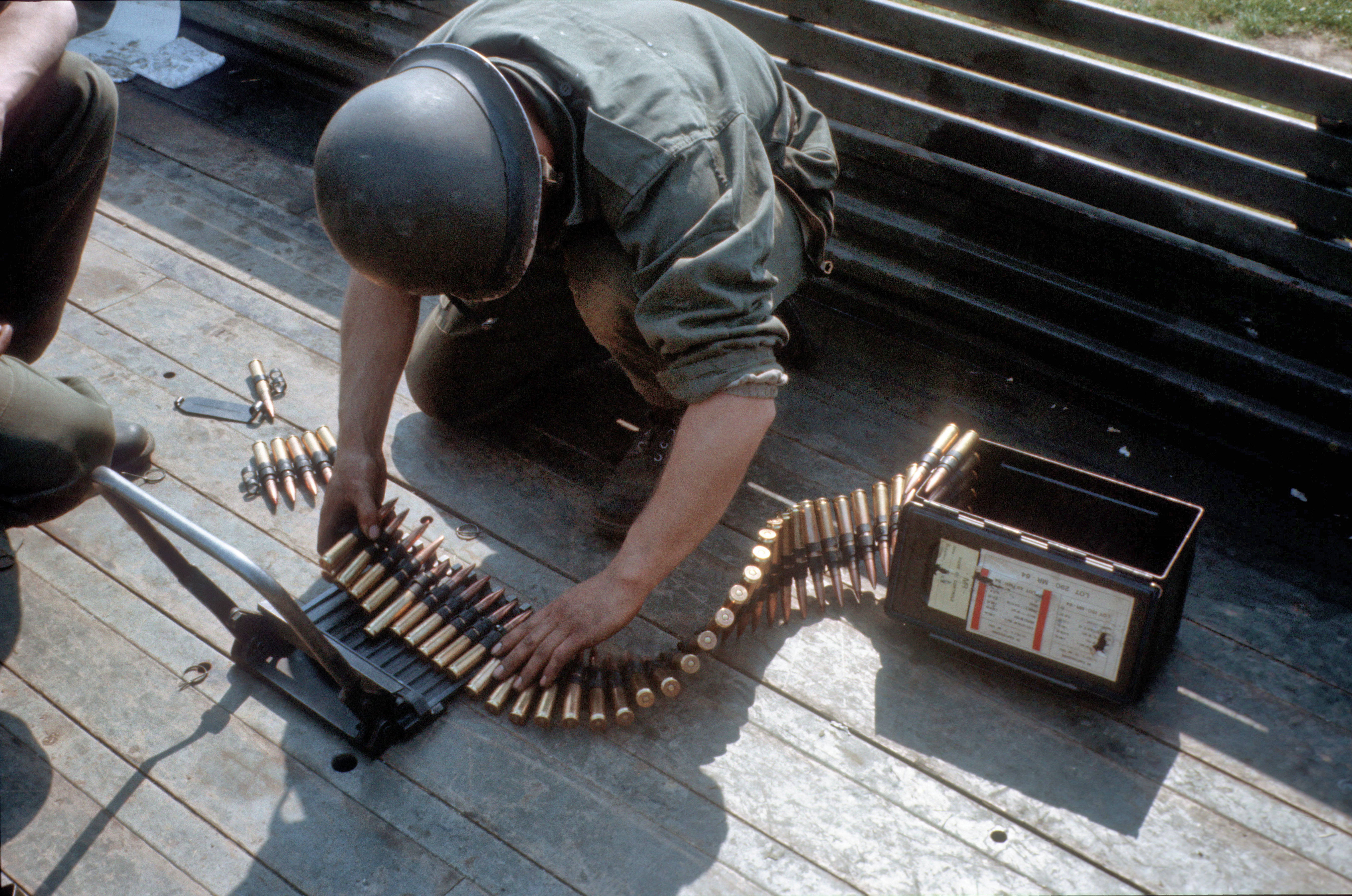 004 Préparation des bandes pour mitrailleuse lourde (12.7mm, Cal 50)